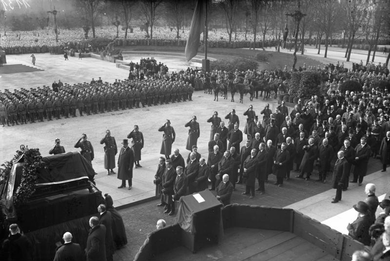 Des Reichspräsidenten letzte Fahrt! Blick auf den Sarg des Reichspräsidenten. Im Hintergrund sämtliche Vertreter der Reichs- und Staatsbehörde.